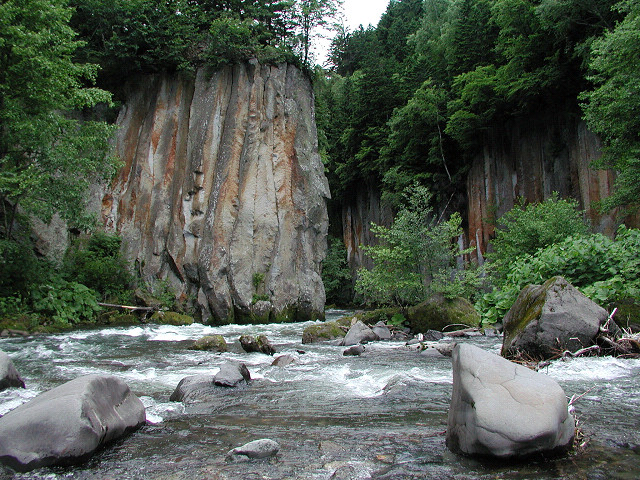 層雲峡・大函 (北海道上川町) Sounkyo Oobako (Kamikawa-Town, Hokkaido, Japan)